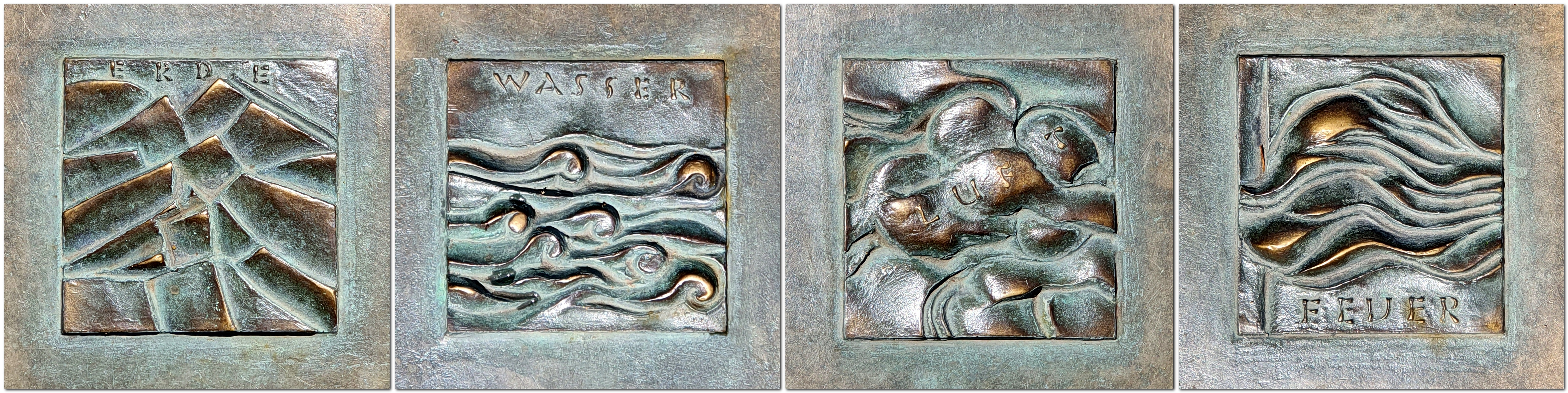 Die Darstellung der Vier Grundelemente: Erde-Wasser-Luft-Feuer auf den Abdeckungsplatten des Vier-Elemente-Brunnens von Huber Elsässer auf auf dem Vorplatz der katholischen Pfarrkirche St. Johann-Baptist in Gröbenzell im Landkreis Fürstenfeldbruck, Abmessungen etwa 30x40 Zentimeter